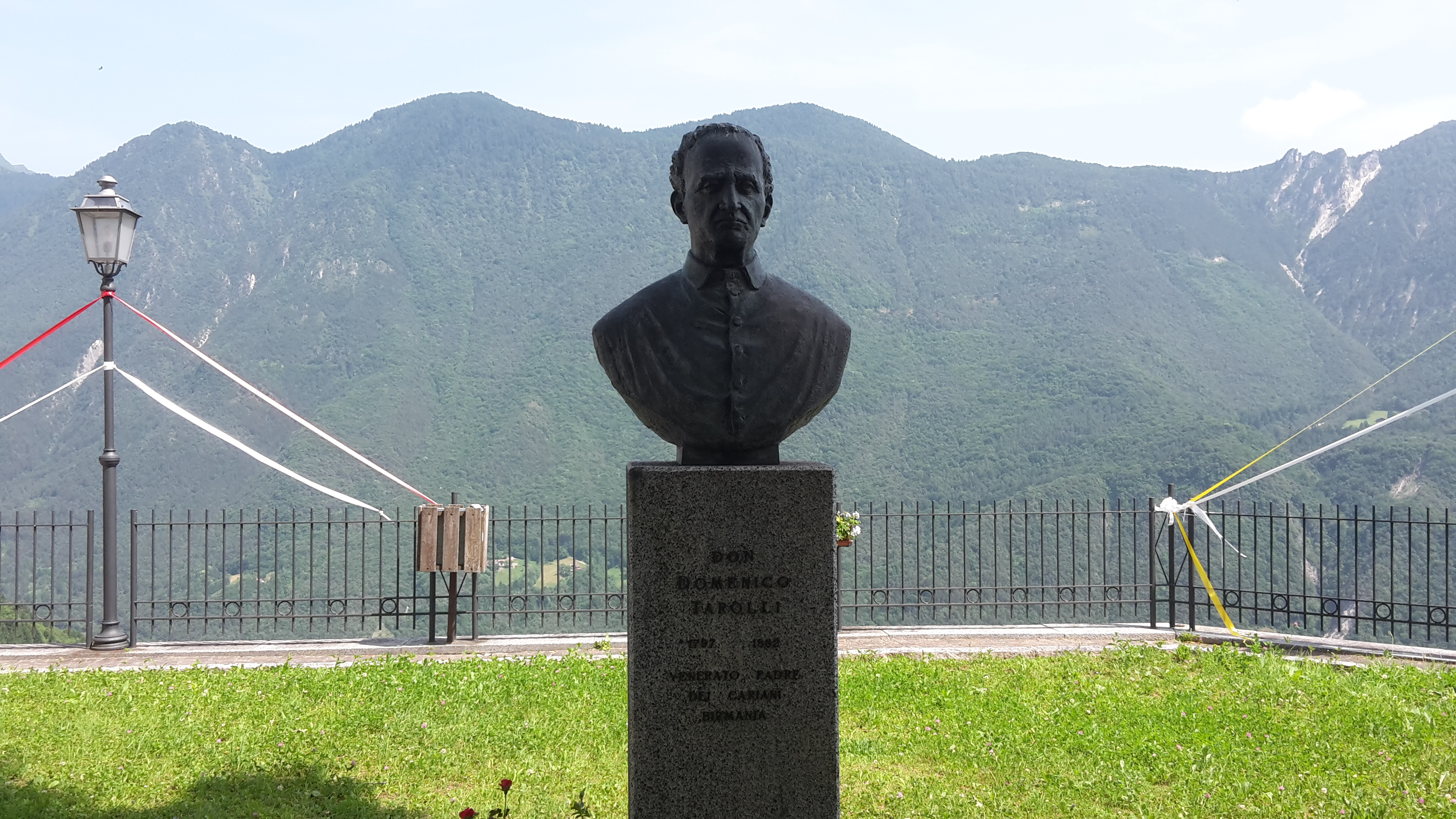 Busto raffigurante Domenico Tarolli collocato nel piazzale antistante la chiesa di san Giorgio a Castel Condino